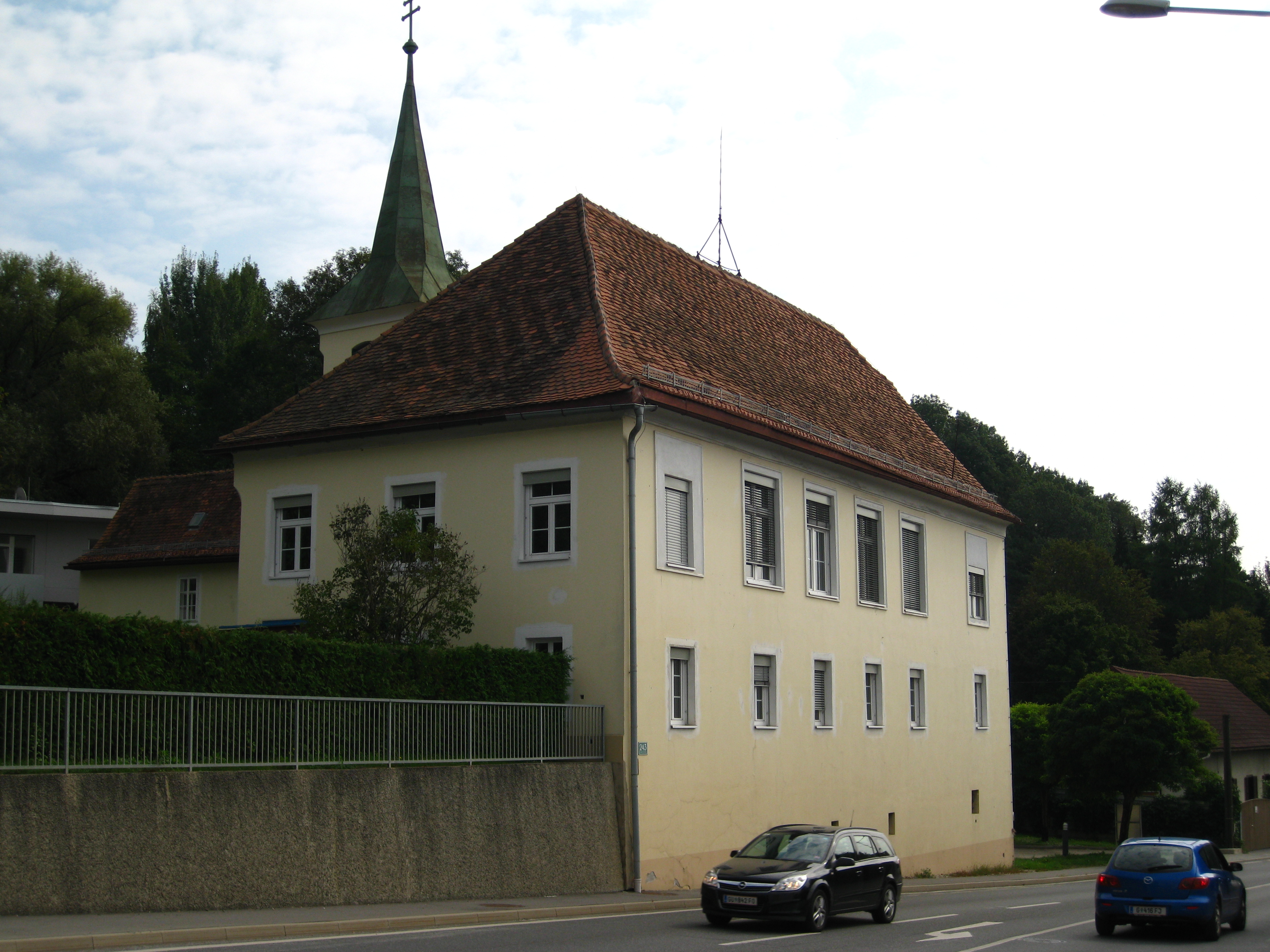 Graz VIII Schloss Moosbrunnerhof